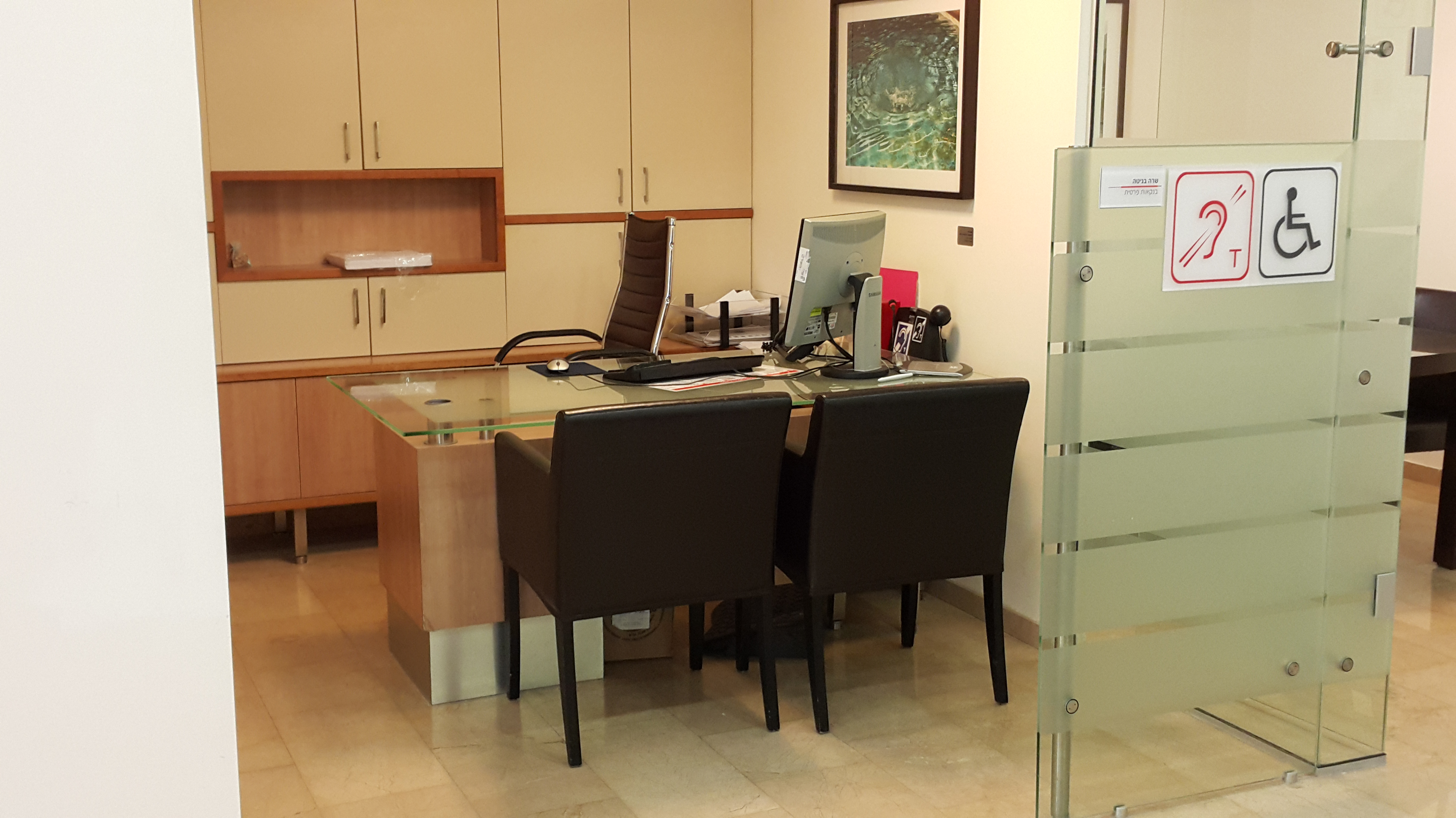 עמדת בנקאי מונגשת